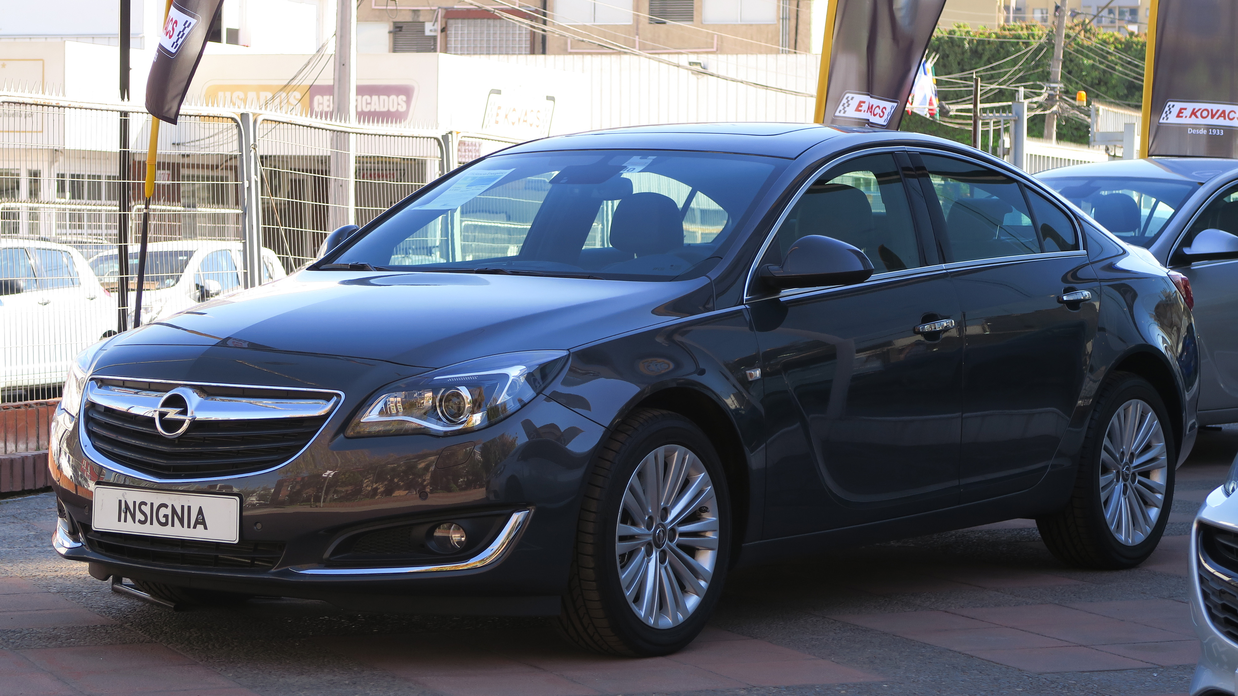 Opel Insignia 2.0T Cosmo 2017